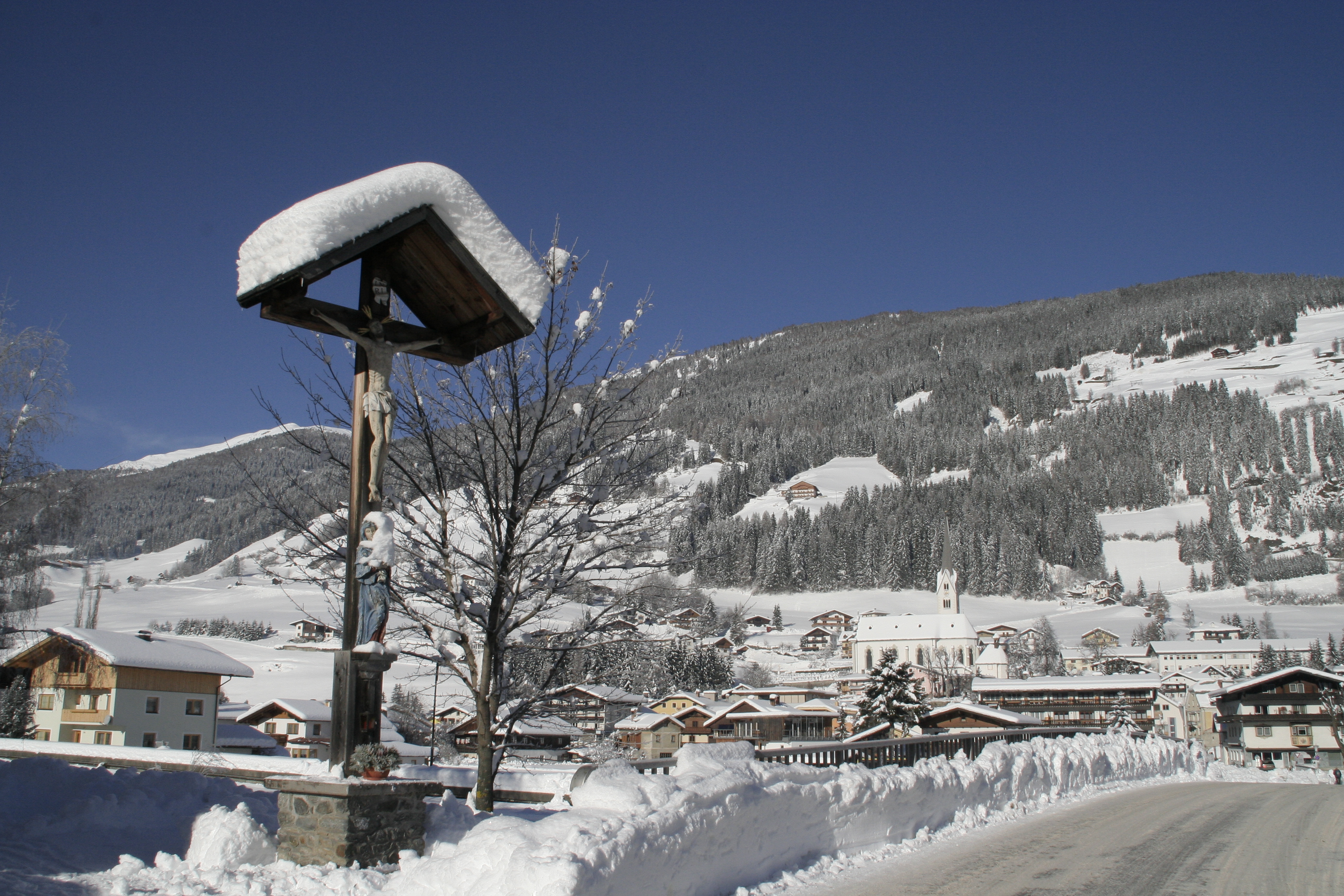 Marktgemeinde Sillian, Ortszentrum, Blick Richtung Norden, vorne "Papprion"-Kreuz, altes historisches Holzkreuz südlich der Draubrücke